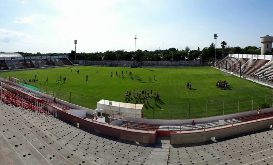 imagen panorámica del estadio de San Martin de Mendoza